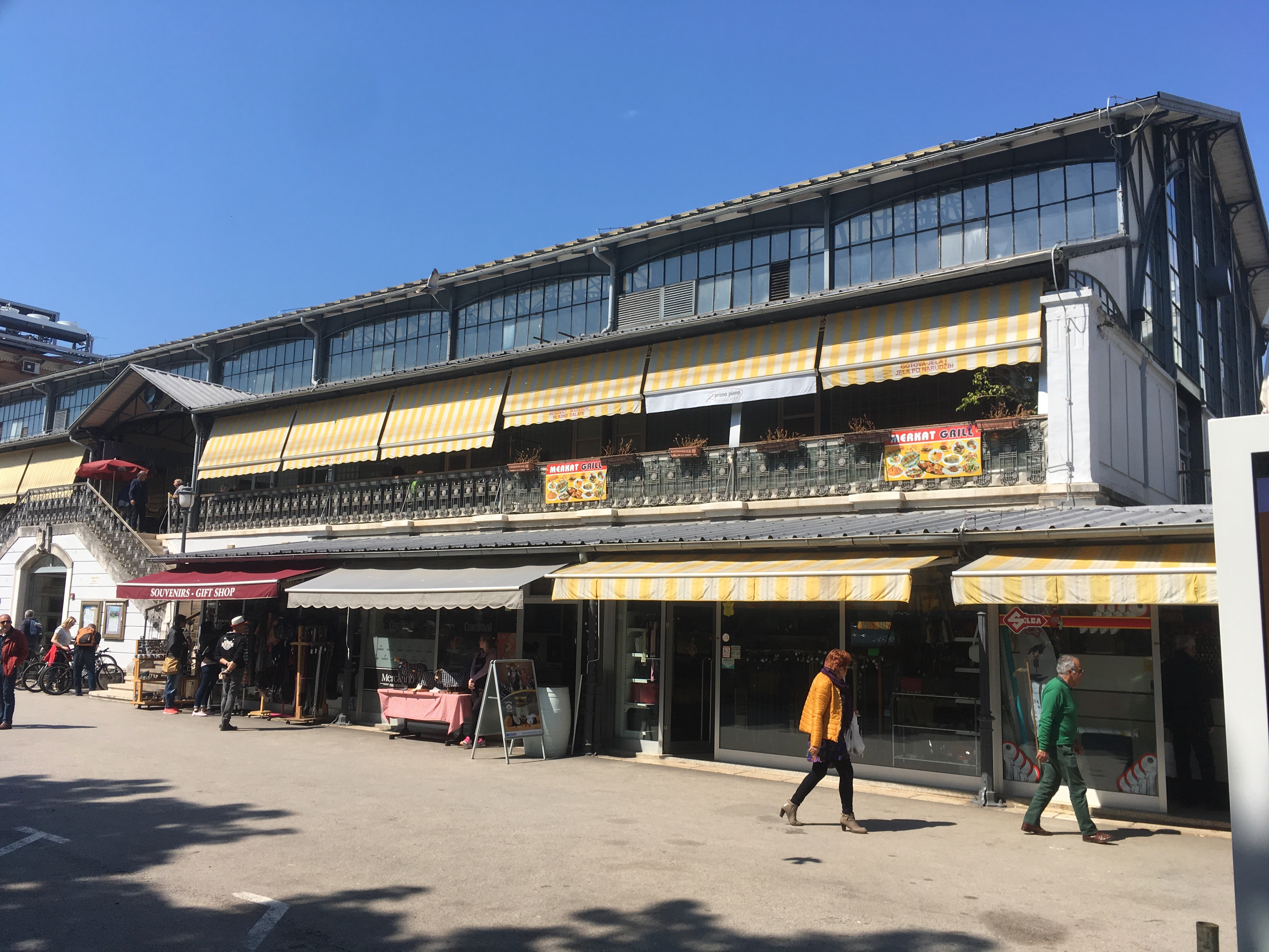 Stadt Markt Pula die Markthalle